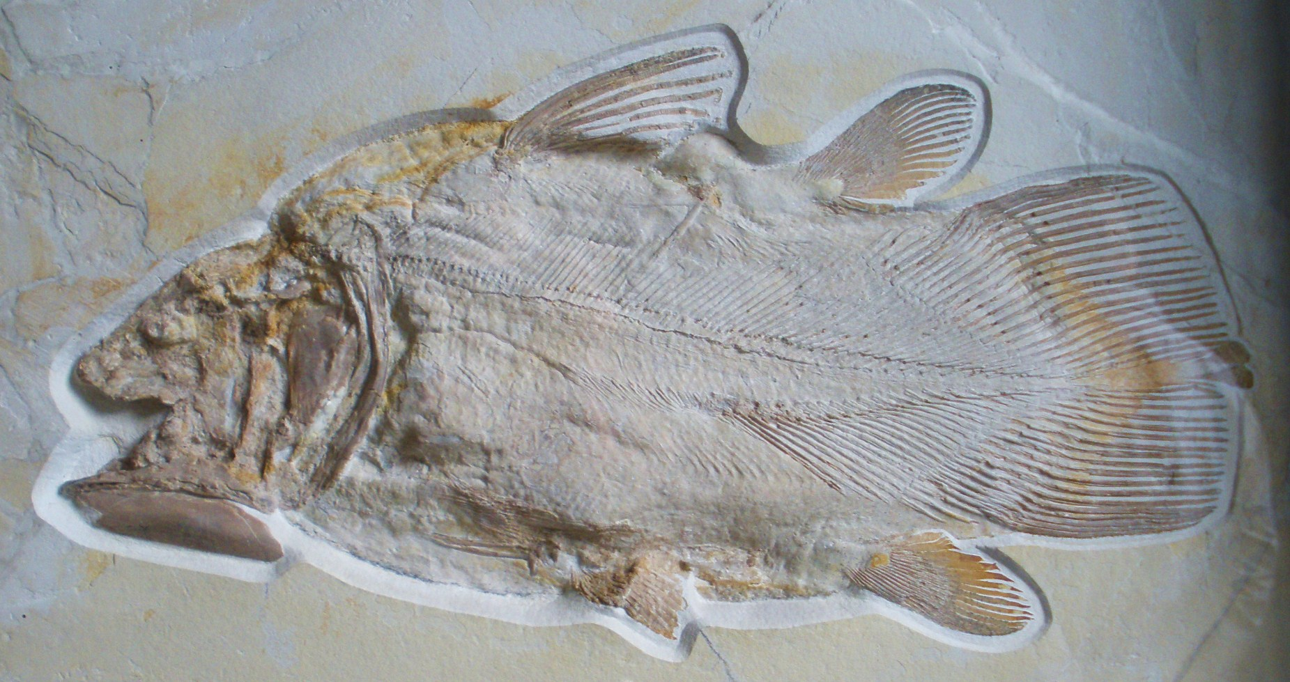 Fossil of Libys, an extinct fish - Took the photo at Teylers Museum, Haarlem